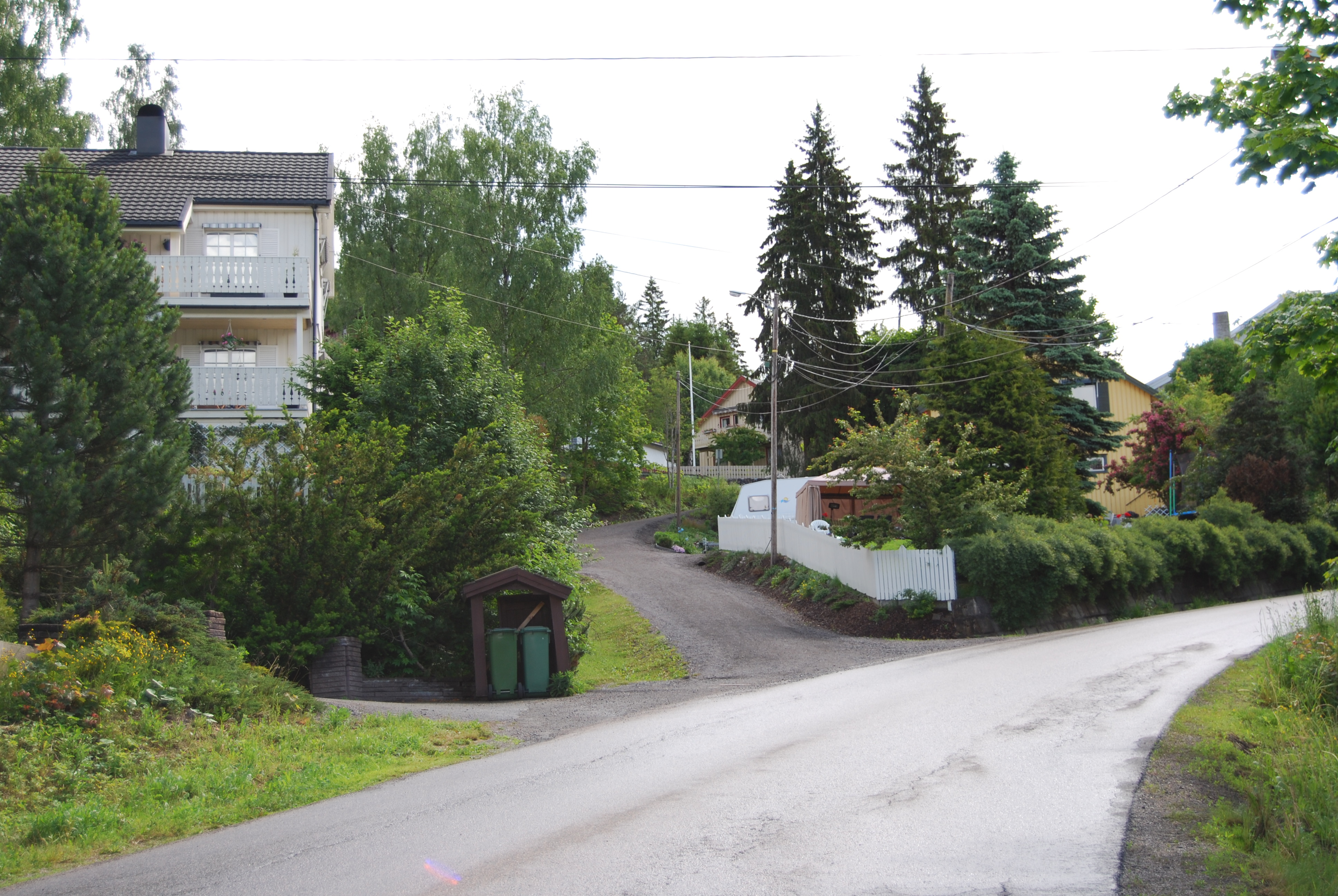 Ulica Gamle Trondheimsveien (Skillebekk Vel koło Oslo) 2009 r.